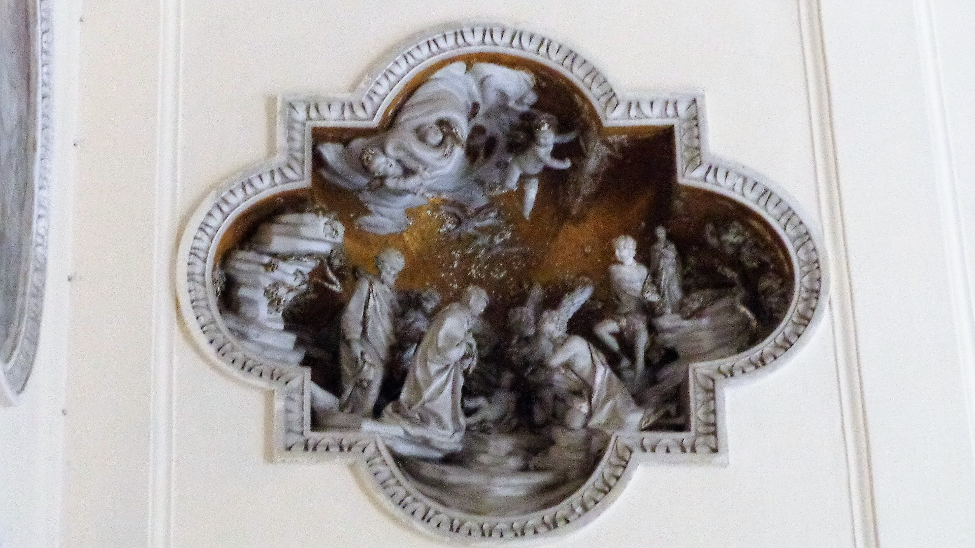 Teatrino raffigurante la Natività di Gesù, attribuzione d'opera presente nella sacrestia o Cappella delle sorelle Spatafora della chiesa della Madonna di Monte Oliveto.